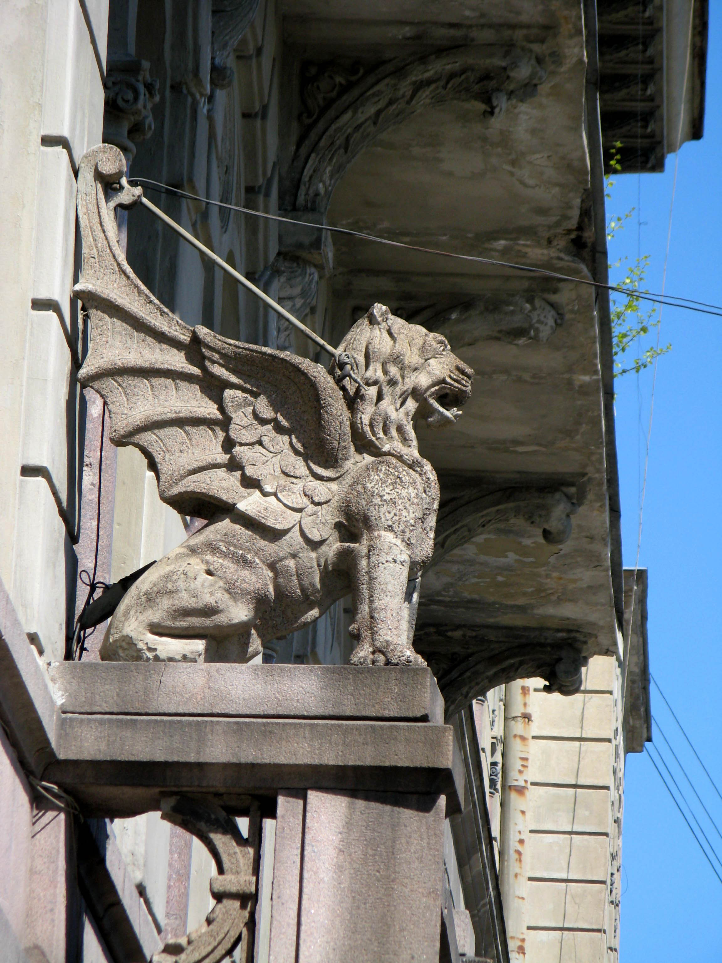 Выборг, здание Объединенного банка Северных стран (ул. Пионерская, д. 4). Грифон на балконе здания